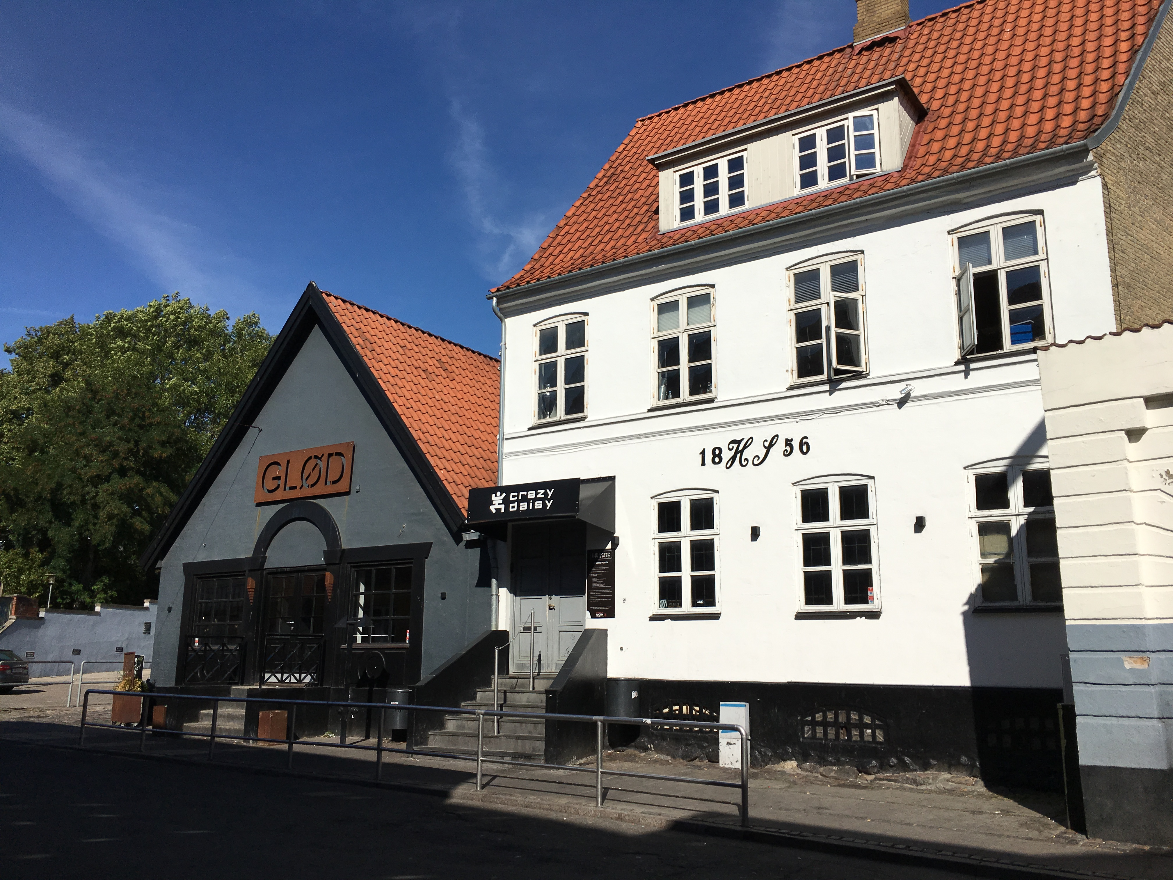 Crazy Daisy i Næstved